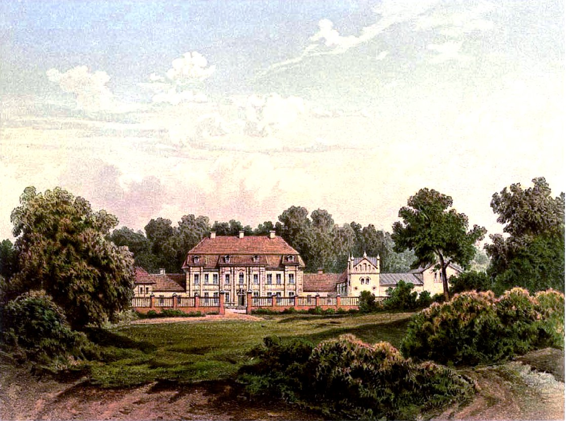 Schloss Stargord, Kreis Regenwalde, Provinz Pommern